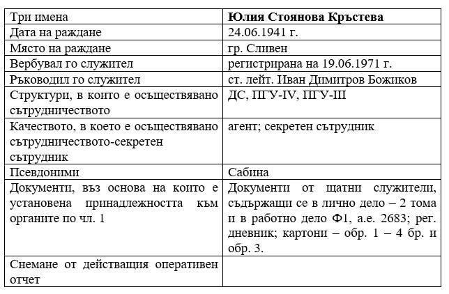 Комисия по досиетата - картон